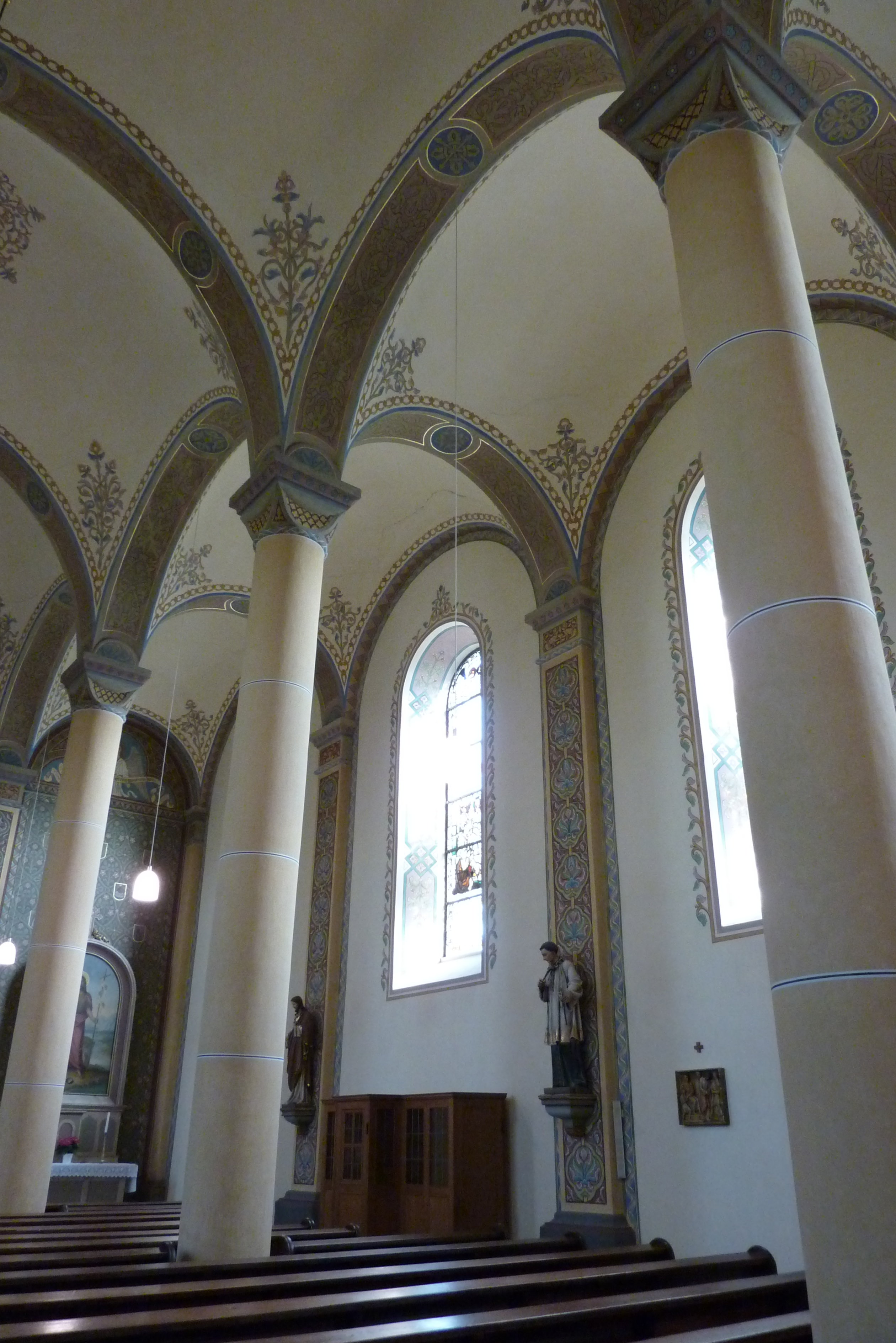 katholische Pfarrkirche St. Johannes der Täufer in Hambuch, Innenraum